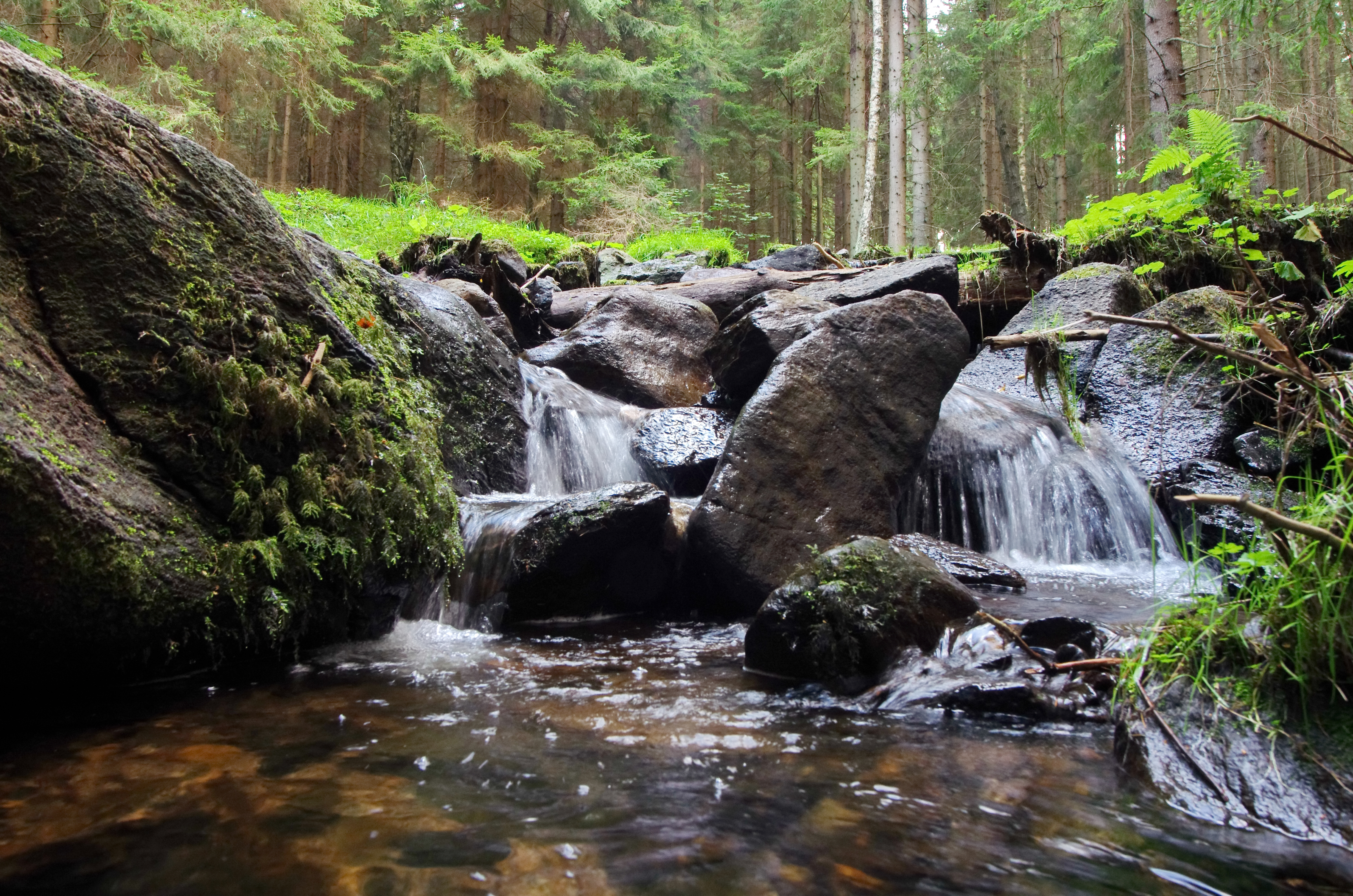 Potok Mřínek, přítok Velké Libavy ve Slavkovském lese, okres Cheb